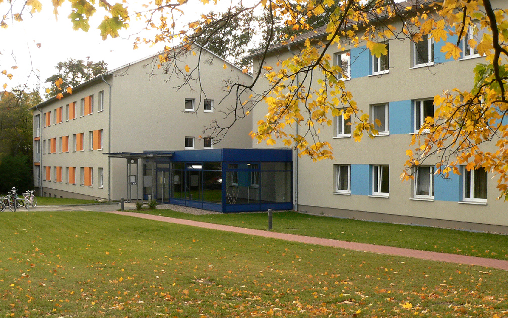 Wohnhaus des Studentenwerk Hannover